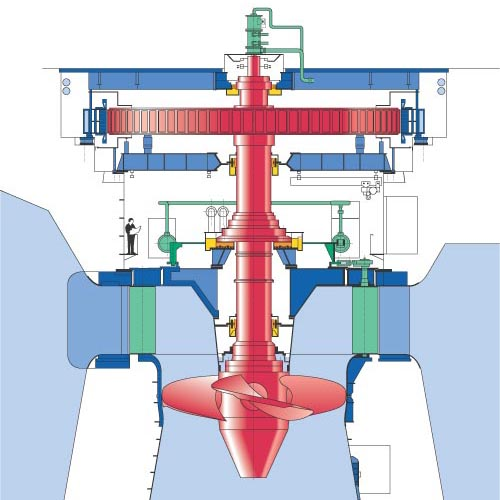 Kaplan-Turbin vert. Schema